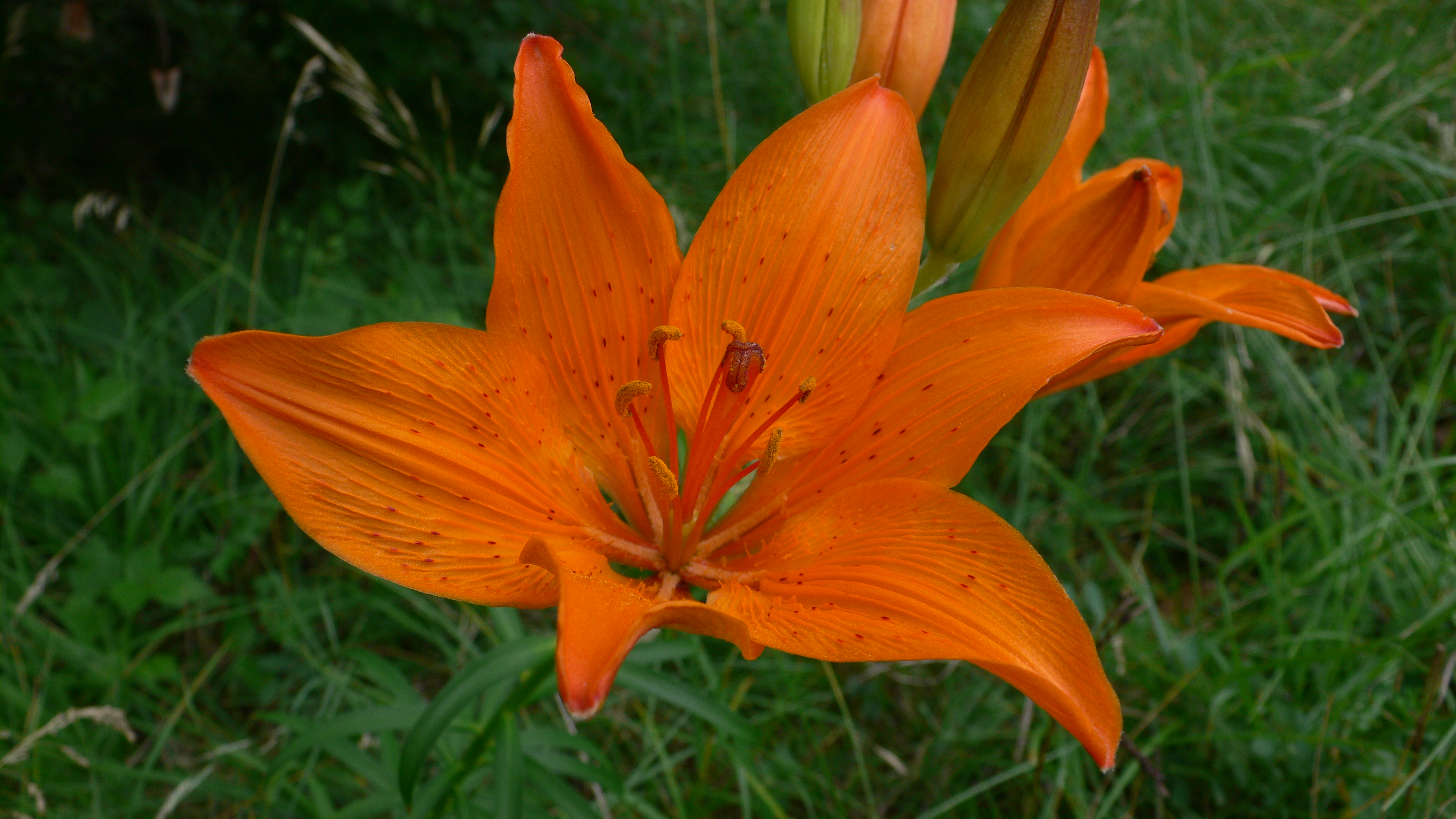 Giglio di S. Givanni (Lilium bulbiferum)